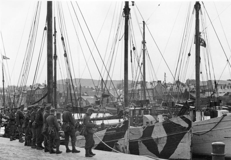 Prop.=Kp. 612, Archiv=Nr.: 6/2387, Bildberichter: Hecht, Text: Hecht, Ort Fècamp, Datum: 9.10.40 Eine kleine Gruppe, welche die Verladung kaum erwarten kann.